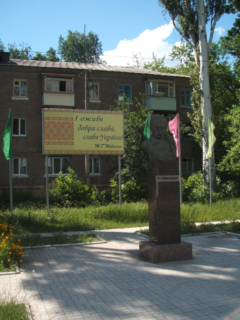 Пам'ятник Т.Г. Шевченку, Вільногірськ